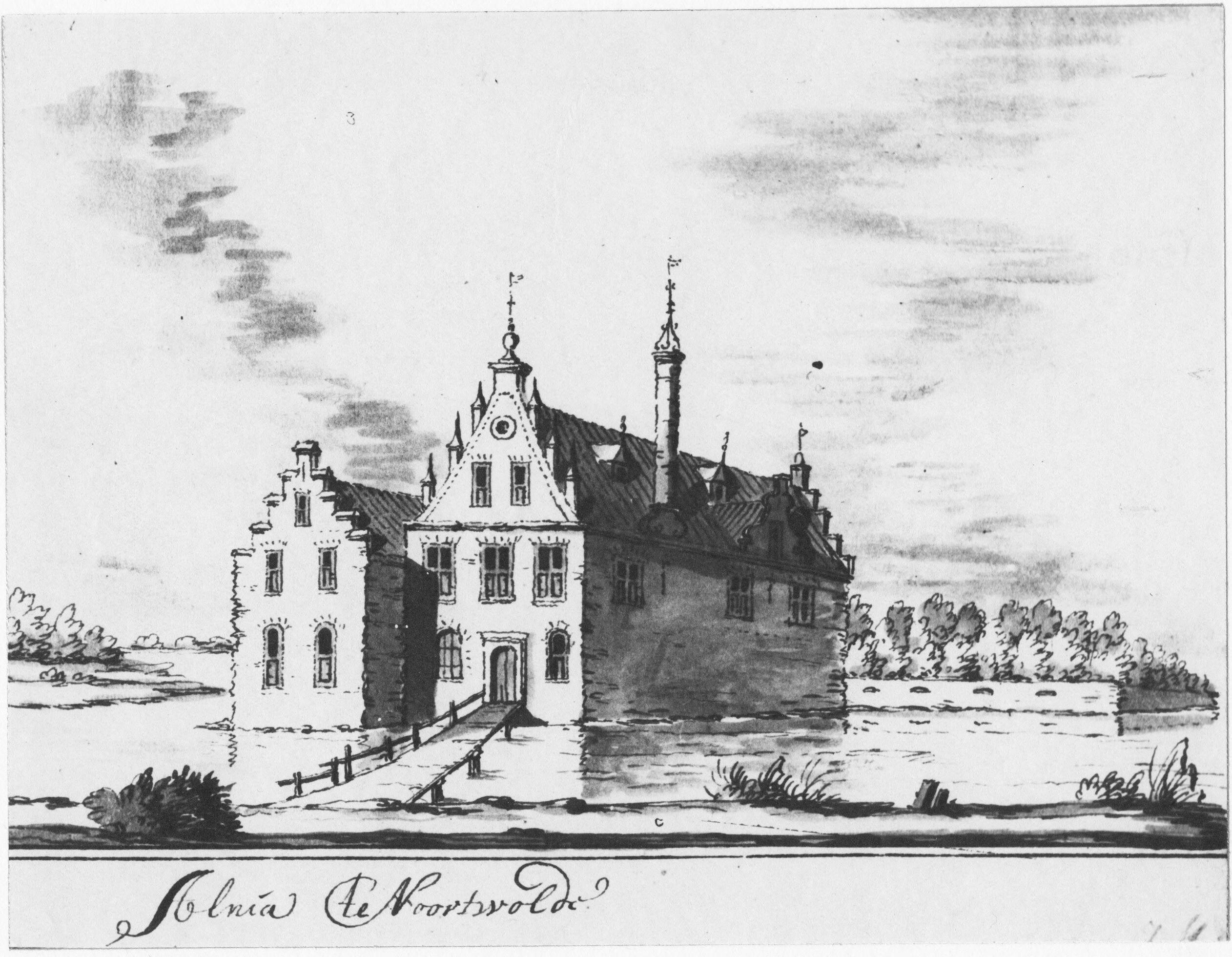 Tekening van de borg Alma door Jacobus Stellingwerf uit Amsterdam. Stellingwerf tekende alleen over en maakte geen eigen tekeningen. De tekening is dus gebaseerd op een andere tekening van Alma.